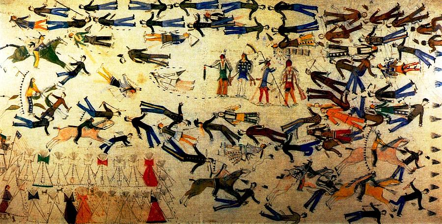 Die Schlacht am Little Bighorn (1876): Malerei von dem Sioux-Häuptling Kicking Bear (Ausschlagender Bär) aus dem Jahre 1898. In der Mitte des Bildes stehen die Häuptlinge Sitting Bull, Rain in the Face, Crazy Horse und Kicking Bear, rechts von der Mitte die rote Figur stellt den geschlagenen Custer dar.